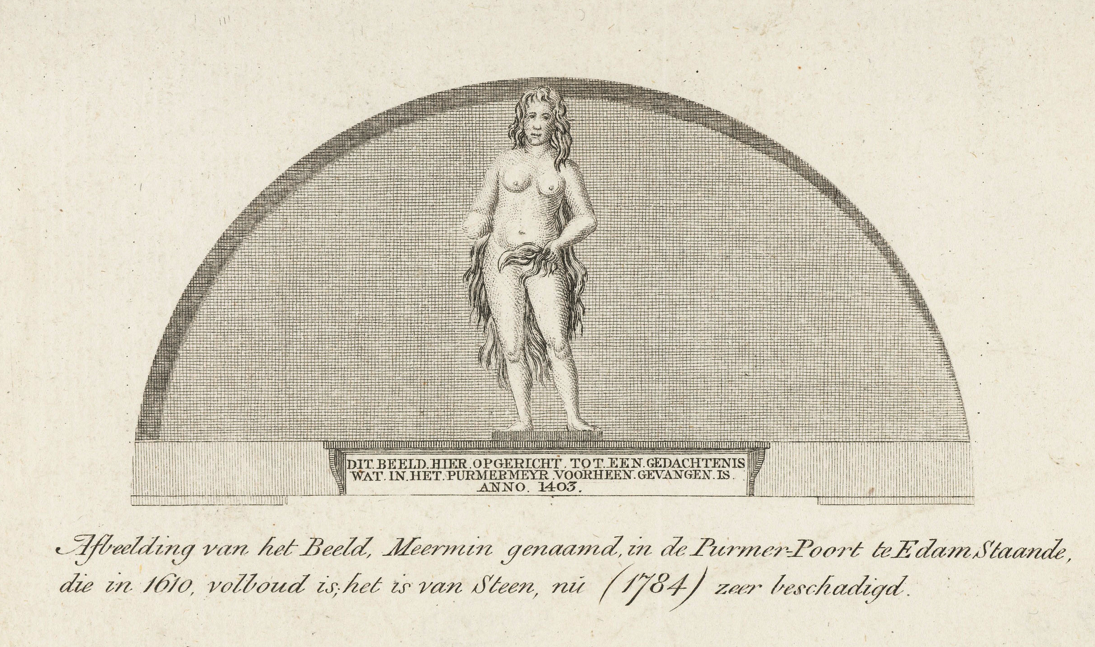 Meermin van Edam, zoals afgebeeld op de in 1835 afgebroken Purmerpoort in Edam